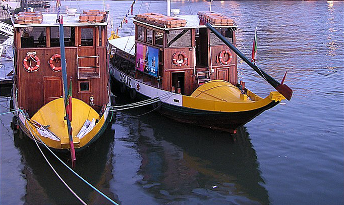 Porto, Portugal Na Galipedia, a Wikipedia en galego. Ten orixe nun poboado prerromano. No tempo dos romanos designábase Cale ou Portus Cale, sendo a orixe do nome de Portugal. Desempeñou un papel fundamental na defensa dos ideais do liberalismo nas batallas do século XIX. Ademais, a coraxe con que soportou o cerco das tropas miguelistas durante a guerra civil de 1832-34 e os feitos valorosos cometidos polos seus habitantes valéronlle mesmo a atribución, pola raíña D. María II, do título – único entre as demais cidades de Portugal – de Invicta Cidade do Porto (aínda hoxe presente no listel das súas armas), de onde o epíteto con que é frecuentemente mencionada por antonomasia - a «Invicta»). O viño do Porto é un produto apreciado máis coñecido internacionalmente. Producido nas beiras do río Douro é o produto da cidade. Como puntos turísticos destácanse a Torre dos Clérigos, da autoría de Nasoni, e a Fundación de Serralves, un museo de arte contemporánea. O Centro Histórico é patrimonio da humanidade, clasificado pola UNESCO. Foi capital europea da cultura en 2001. A cidade do Porto é tamén coñecida pola imponencia e innovación das súas pontes, sendo a cidade con maior número de pontes nun río, na Europa.